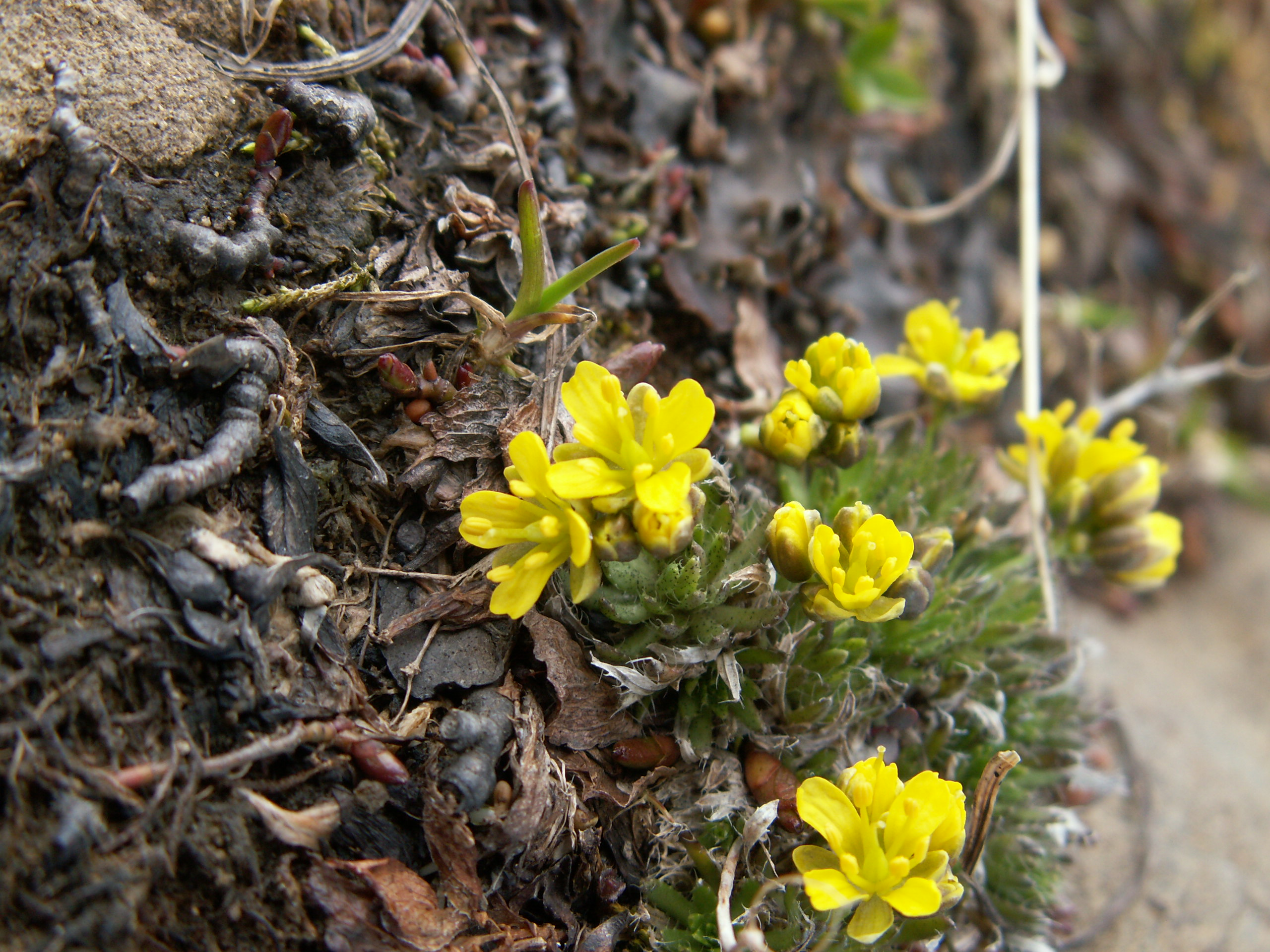 Immergrünes Felsenblümchen (Draba aizoides), Schynige Platte, Kanton Bern, Schweiz